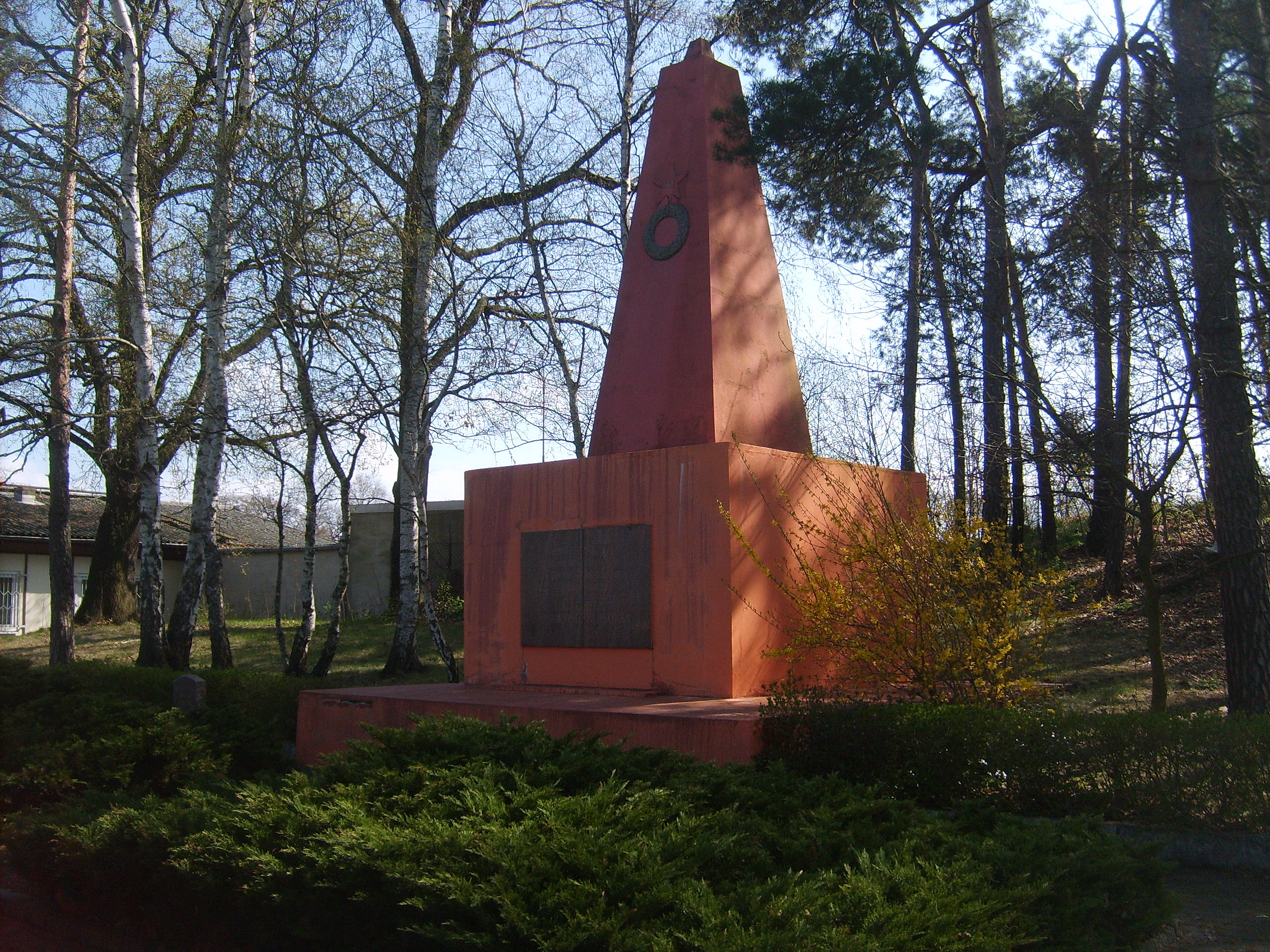 Denkmal für 188 ermordete Kriegsgefangene in Koselitz.